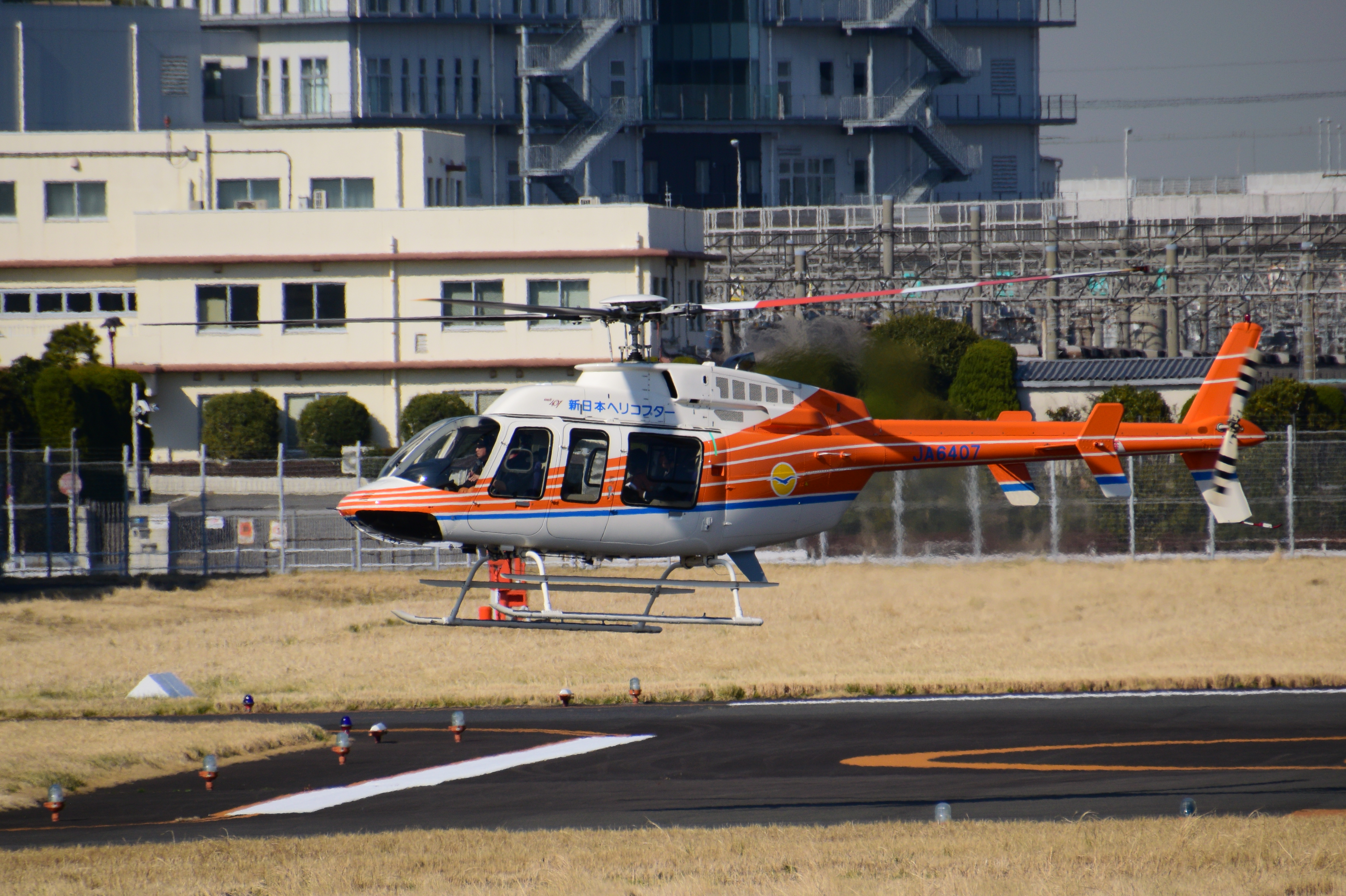 新日本ヘリコプターのB407